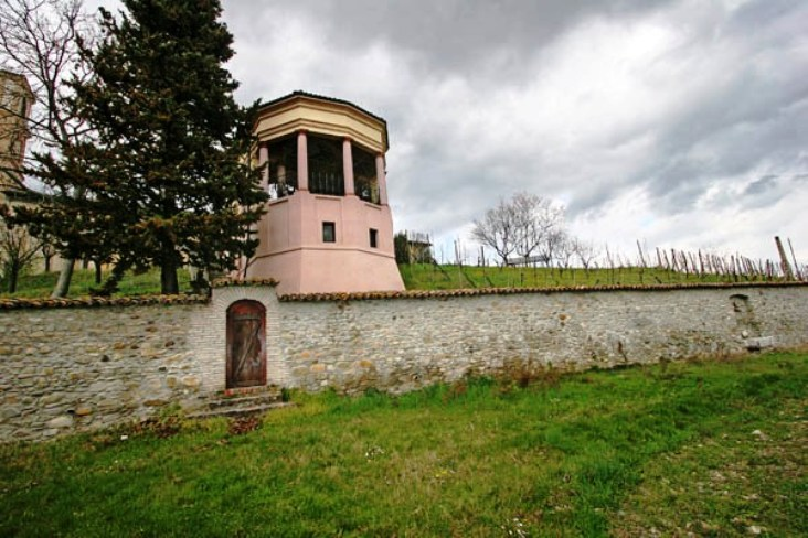 Esterno della badia di Santa Maria della Neve a Torrechiara.